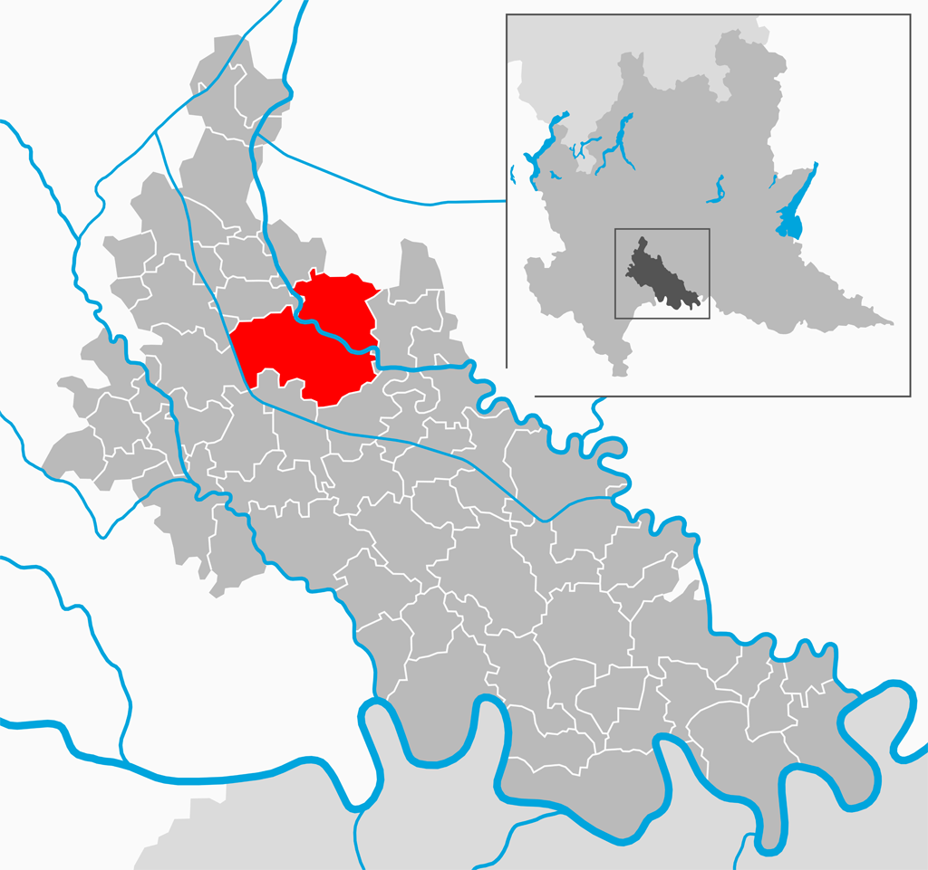 Il comune di Lodi nella provincia di Lodi